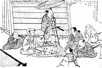 八坂神社本『洛中洛外図屏風』（1615年-1635年）にみえる門説経